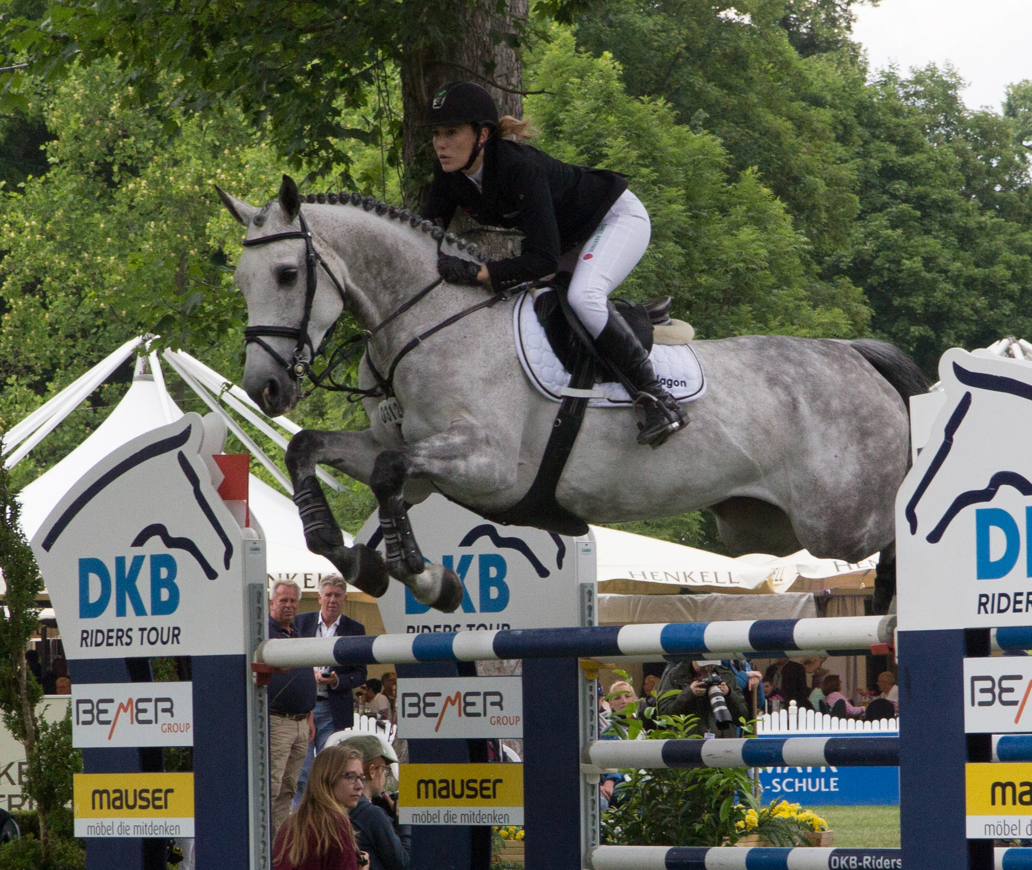 Internationales Wiesbadener Pfingstturnier 2018. CSI 4* Springprüfung KI.S *** m. Stechen (1,50m) "Preis des Hessischen Ministerpräsidenten": Janne Friederike Meyer-Zimmermann auf Bali